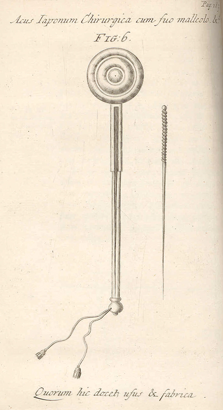 Japanisches Akupunkturhämmerchen und Nadel für die sogenannte „Schlagnadelung“ nach Mubun. Nadeln, Techniken und Therapieort sind eine eigenständige japanische Entwicklung.